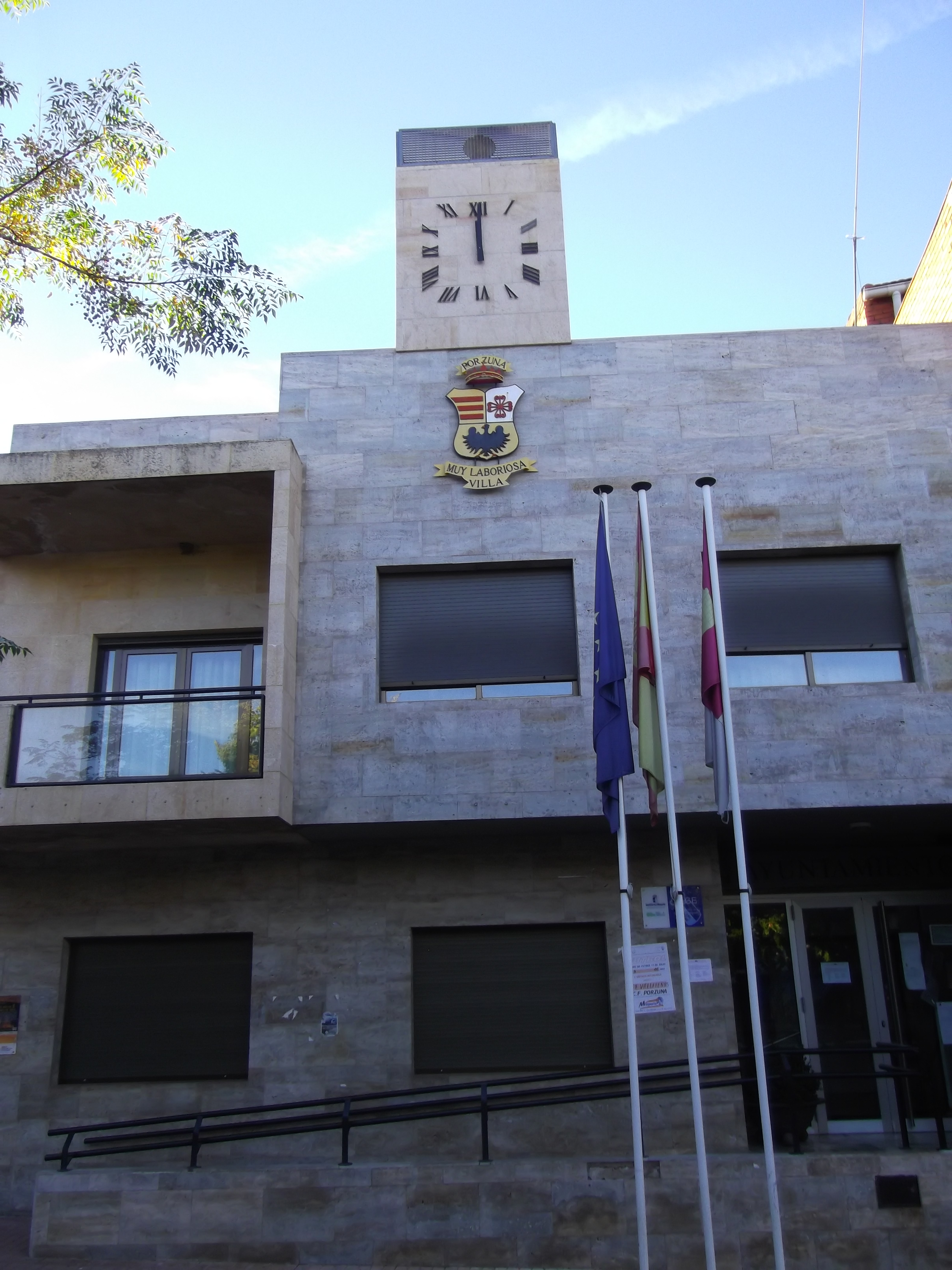 Fachada de la Casa Consistorial de Porzuna en la que se aprecia el escudo del municipio